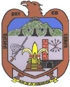 Stemma del comune messicano di Concepción del Oro